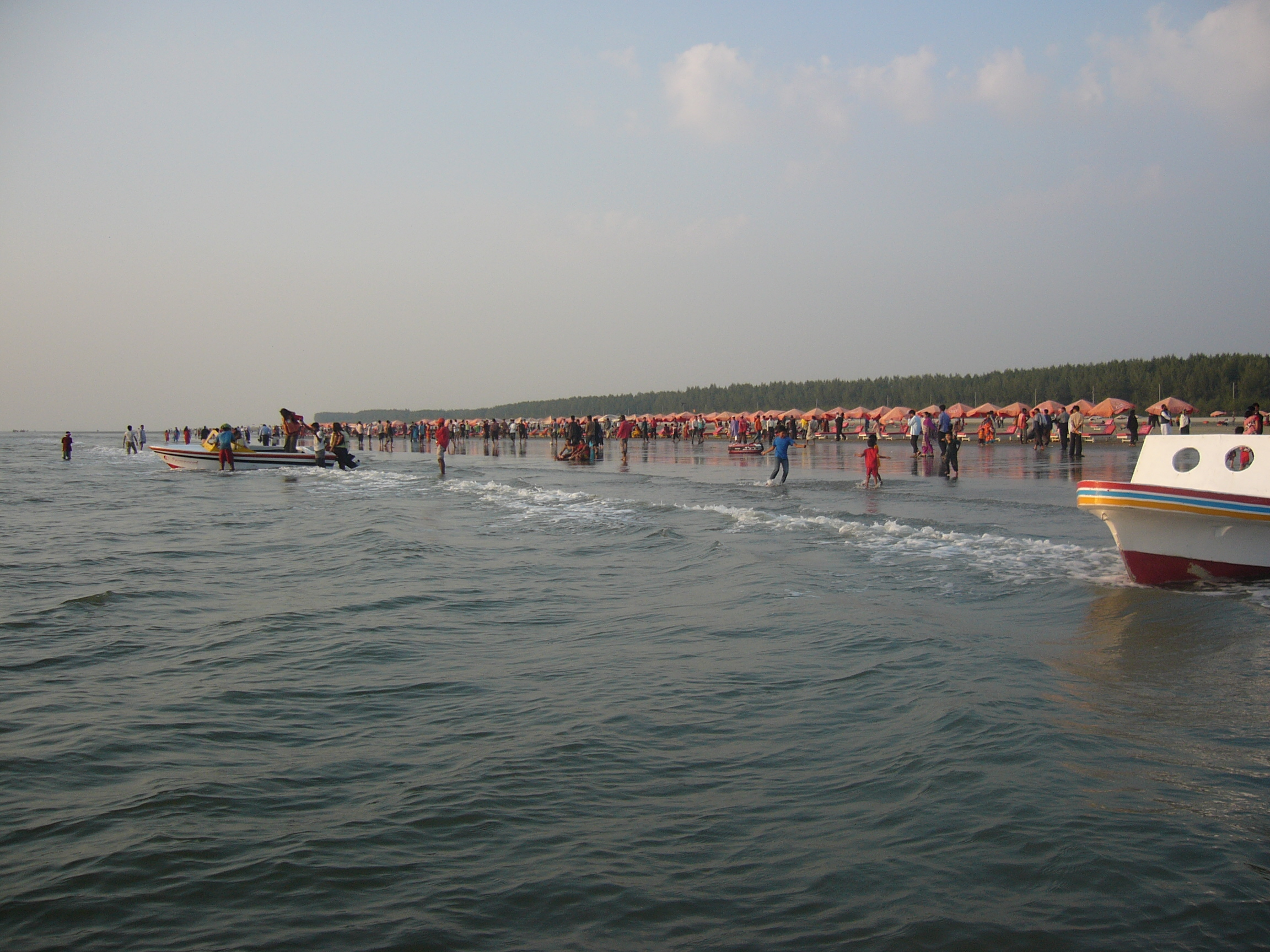 Cox's Bazar Bangladesh